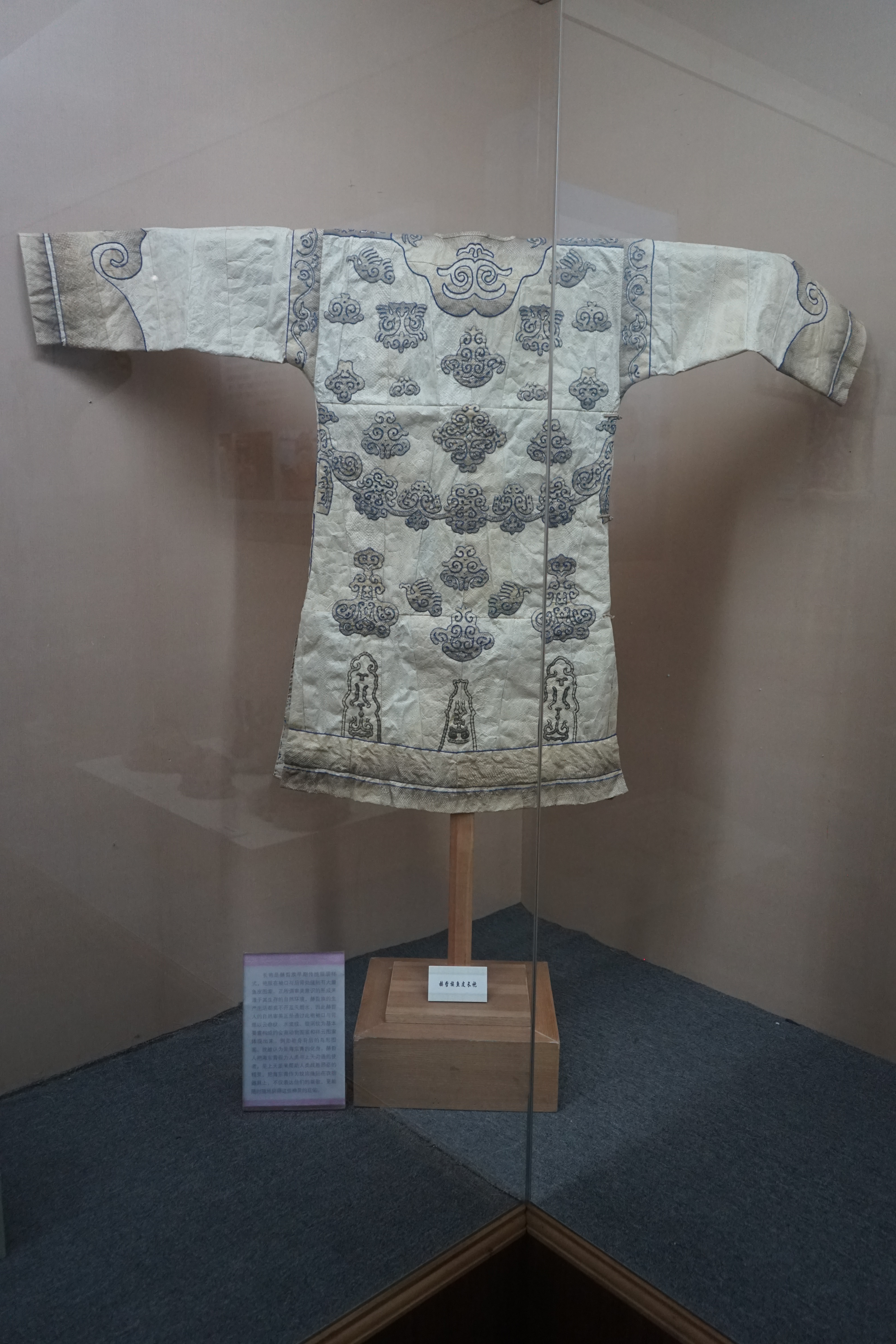 赫哲族鱼皮长袍